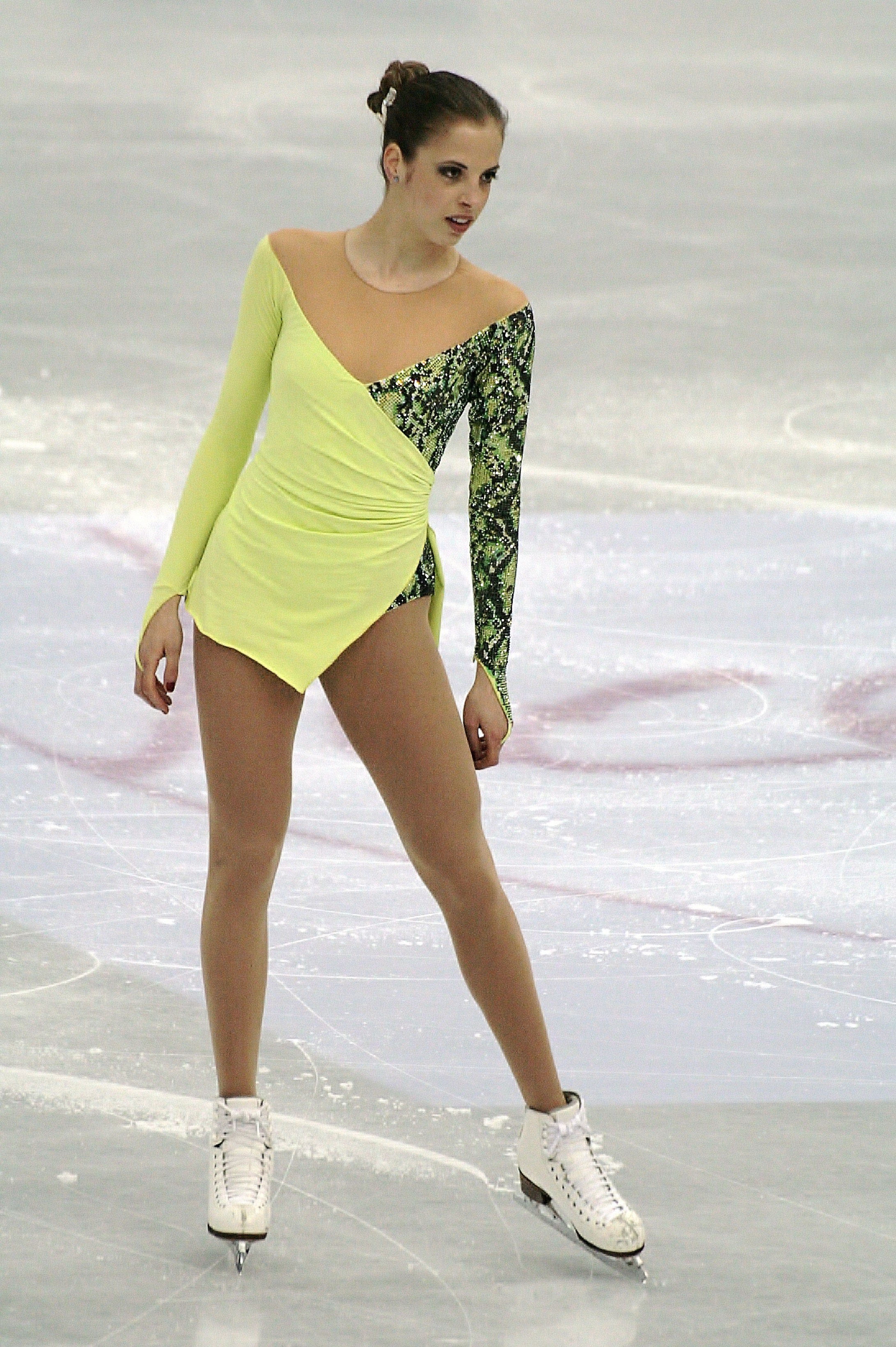 Каролина Костнер (Италия) на чемпионате мира по фигурному катанию 2012